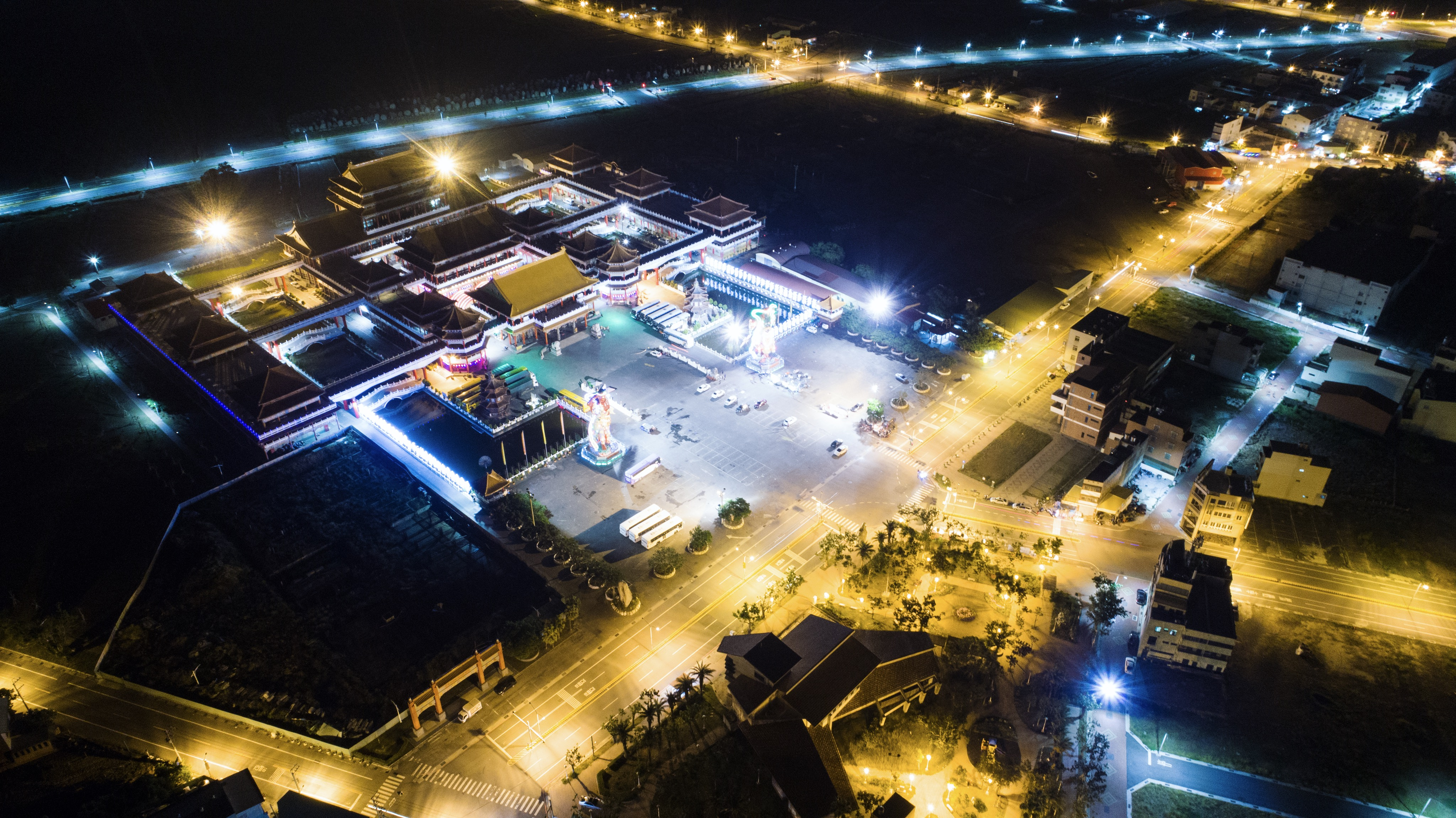 中文（台灣）: 夜間的正統鹿耳門聖母廟